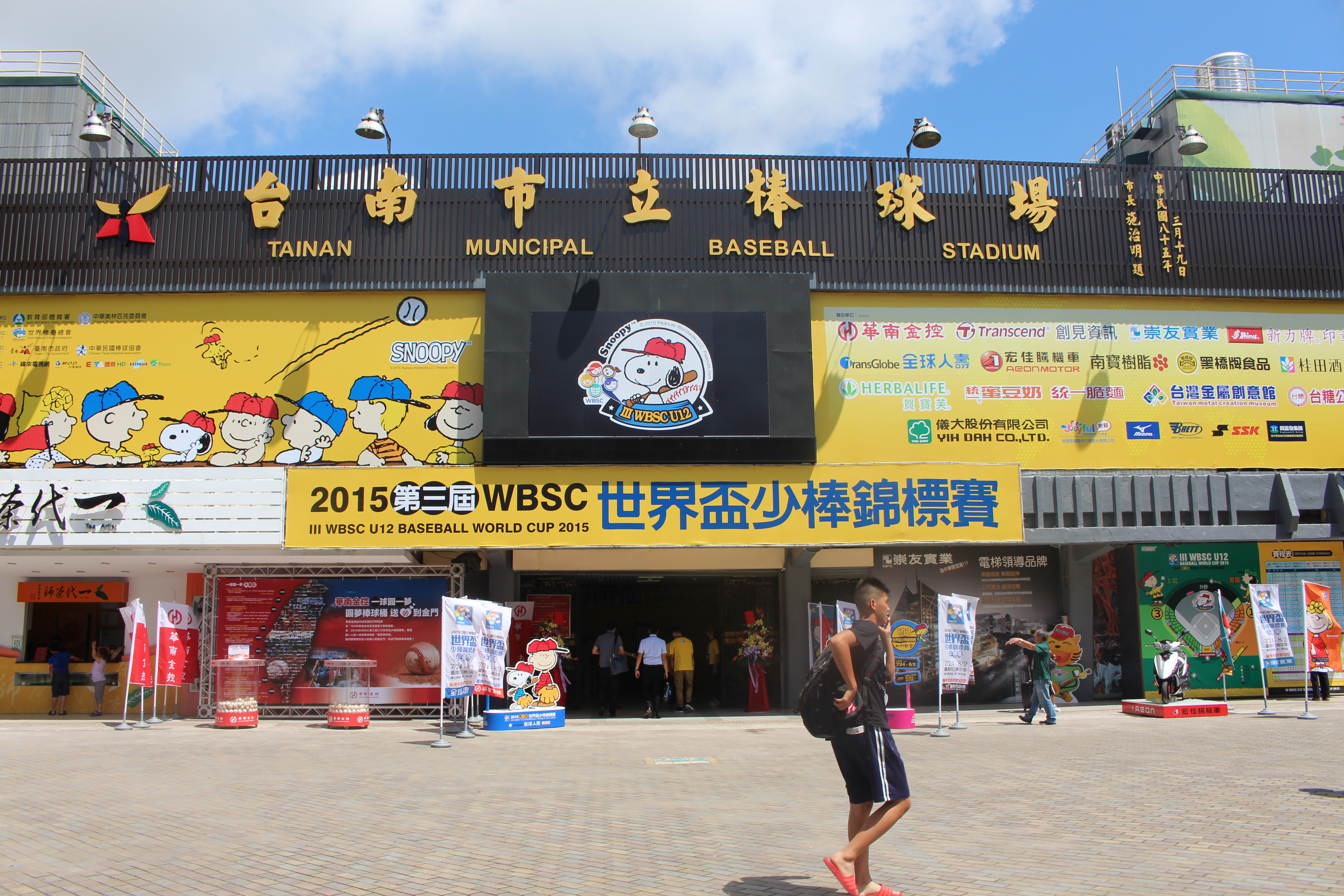 2015年第三屆12U世界盃棒球賽在臺南市立棒球場開賽。